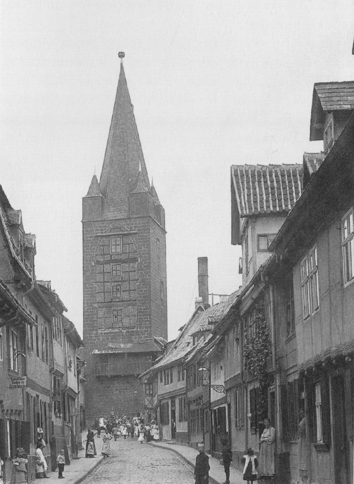 Schreckensturm und Goldstraße, Quedlinburg um 1900